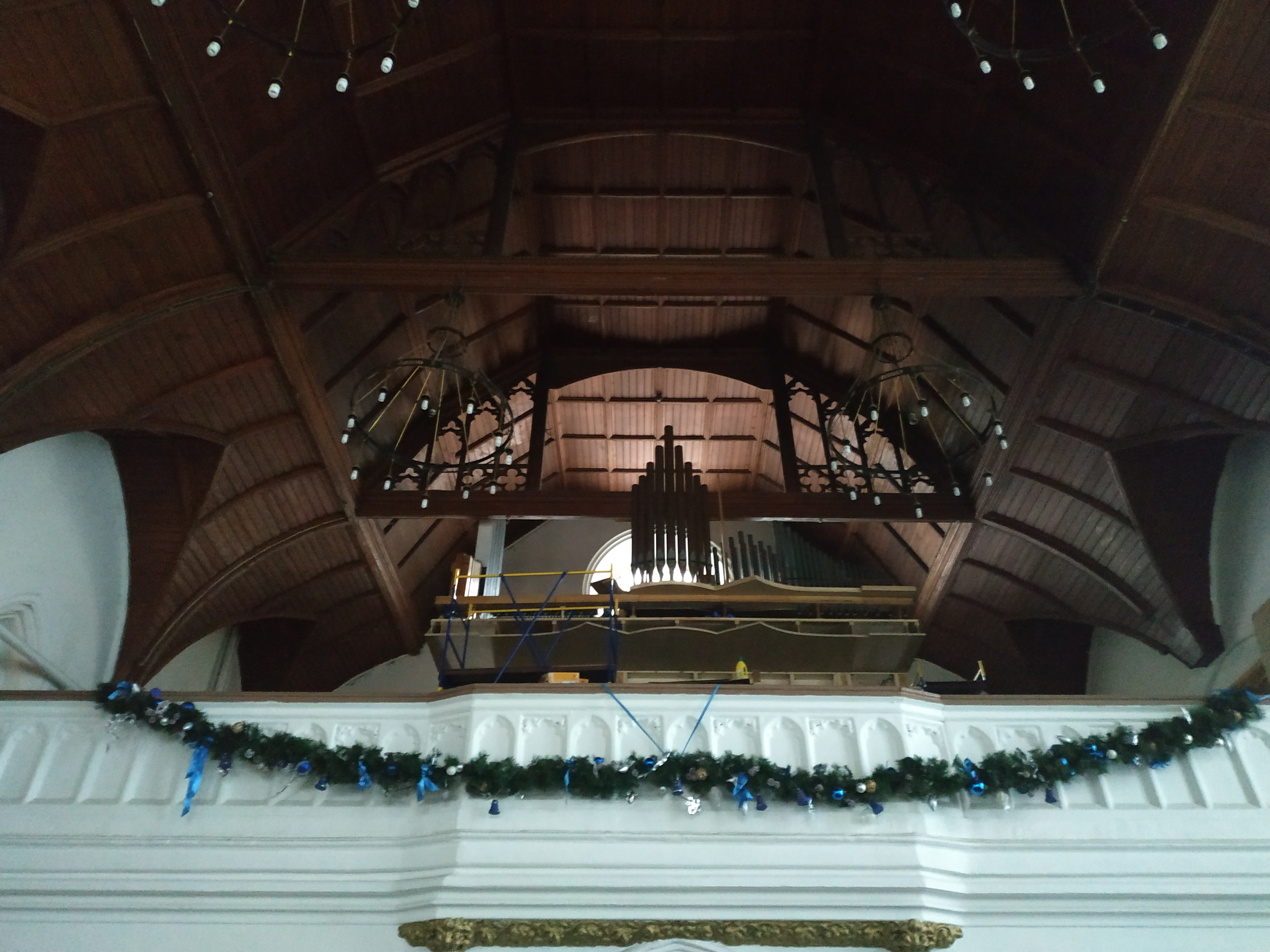 Установка духового органа в Англиканской церкви св. Андрея в Москве